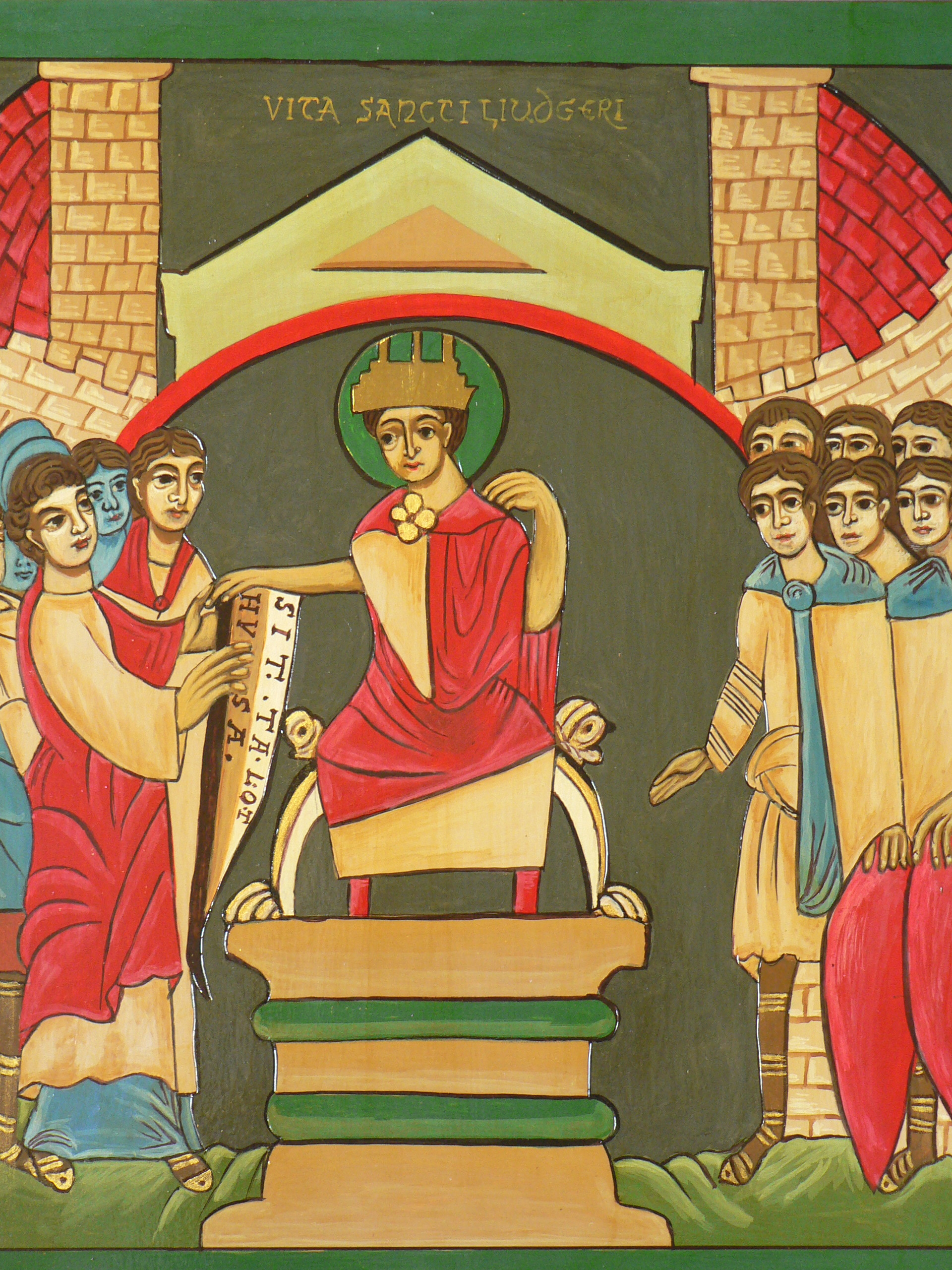 eigene Datei, Ikonenmalerie (2001), nach Vita secunda sancti Liudgeri (um 1100 Essen Werden)